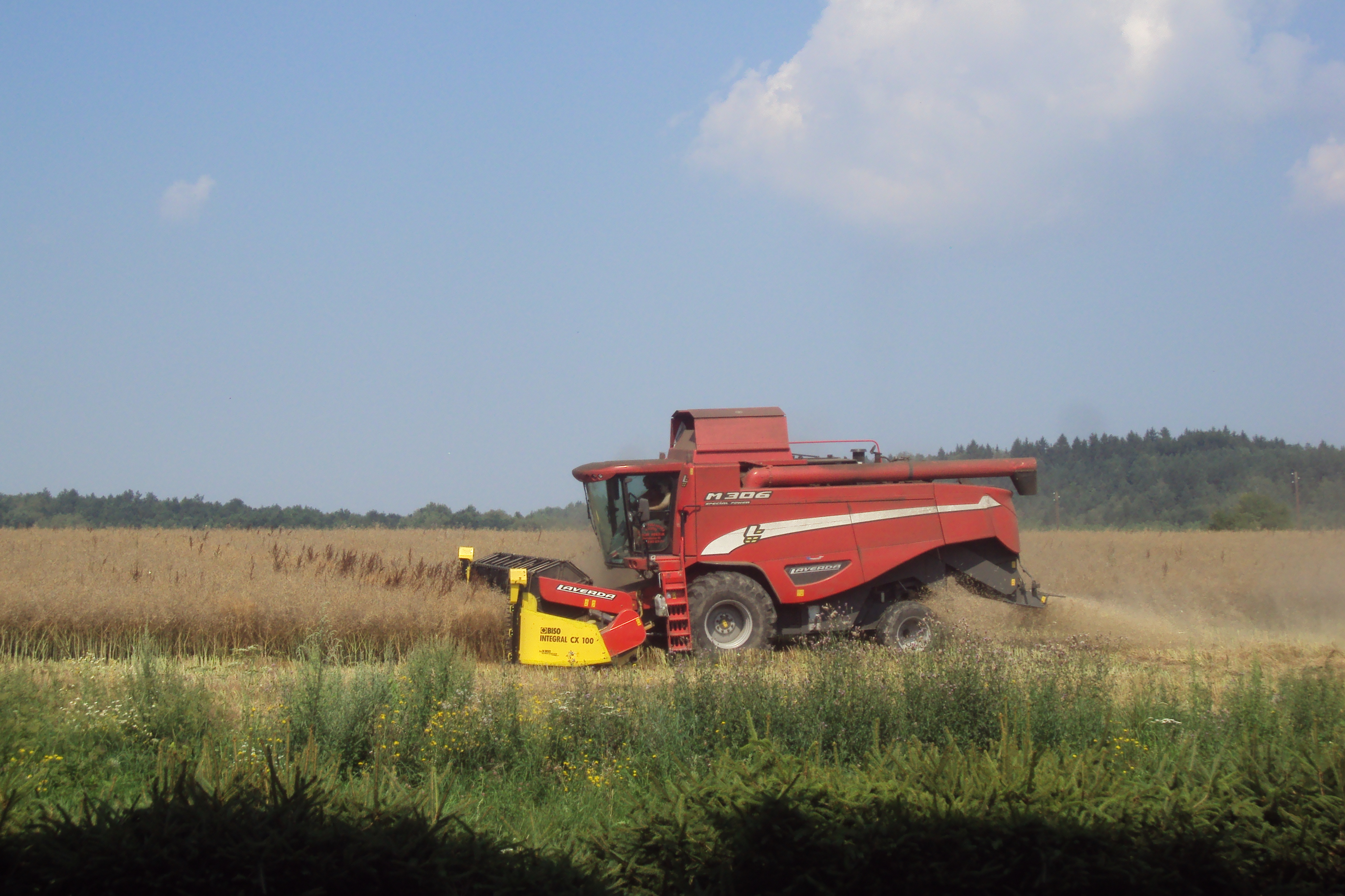 Sklizeň řepky olejné z balkonu, vše patří ZOD Brniště